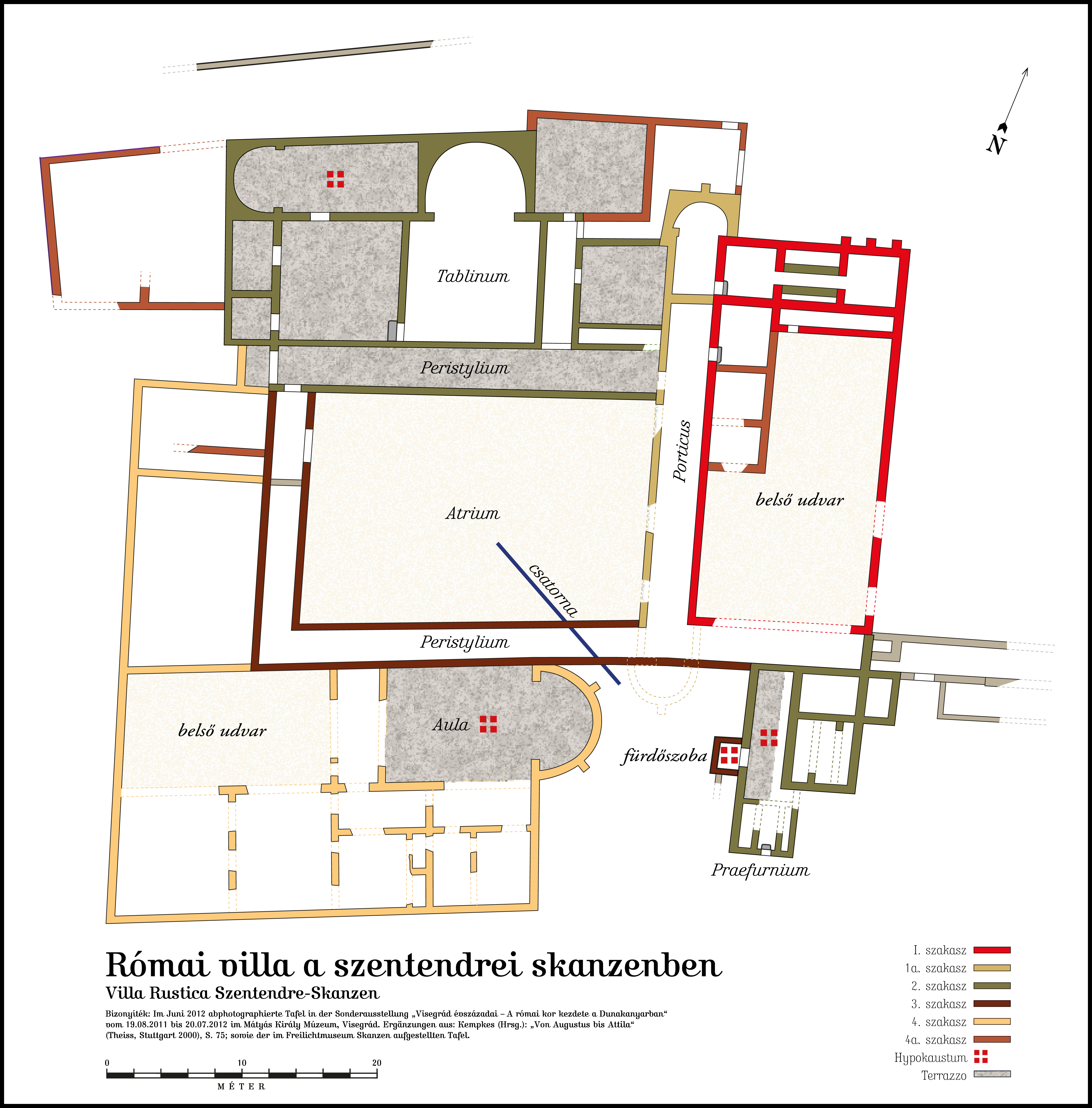 Villa Rustica, Skanzen–Szentendre, Ungarn